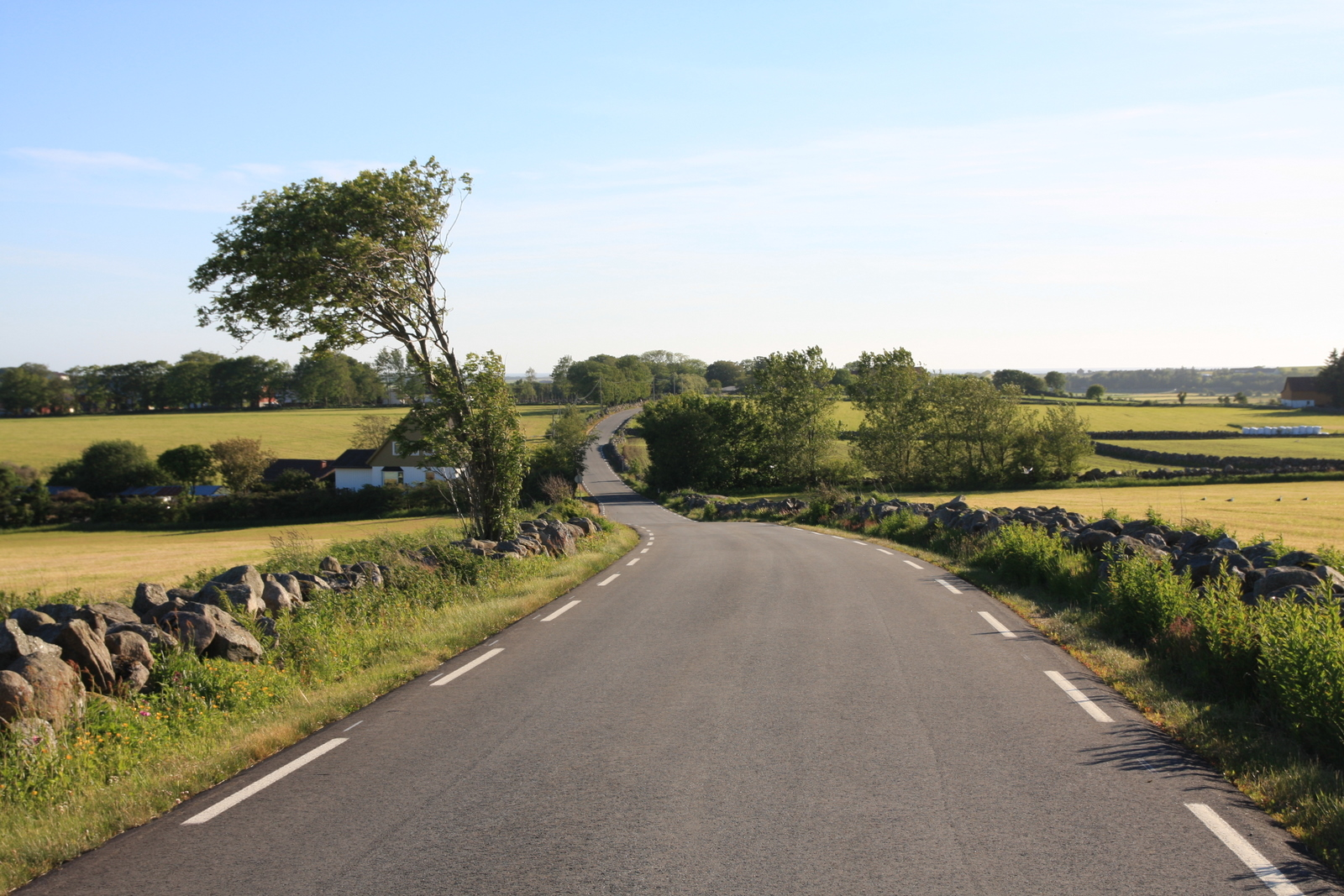 Fylkesvei 243 Skasvegen